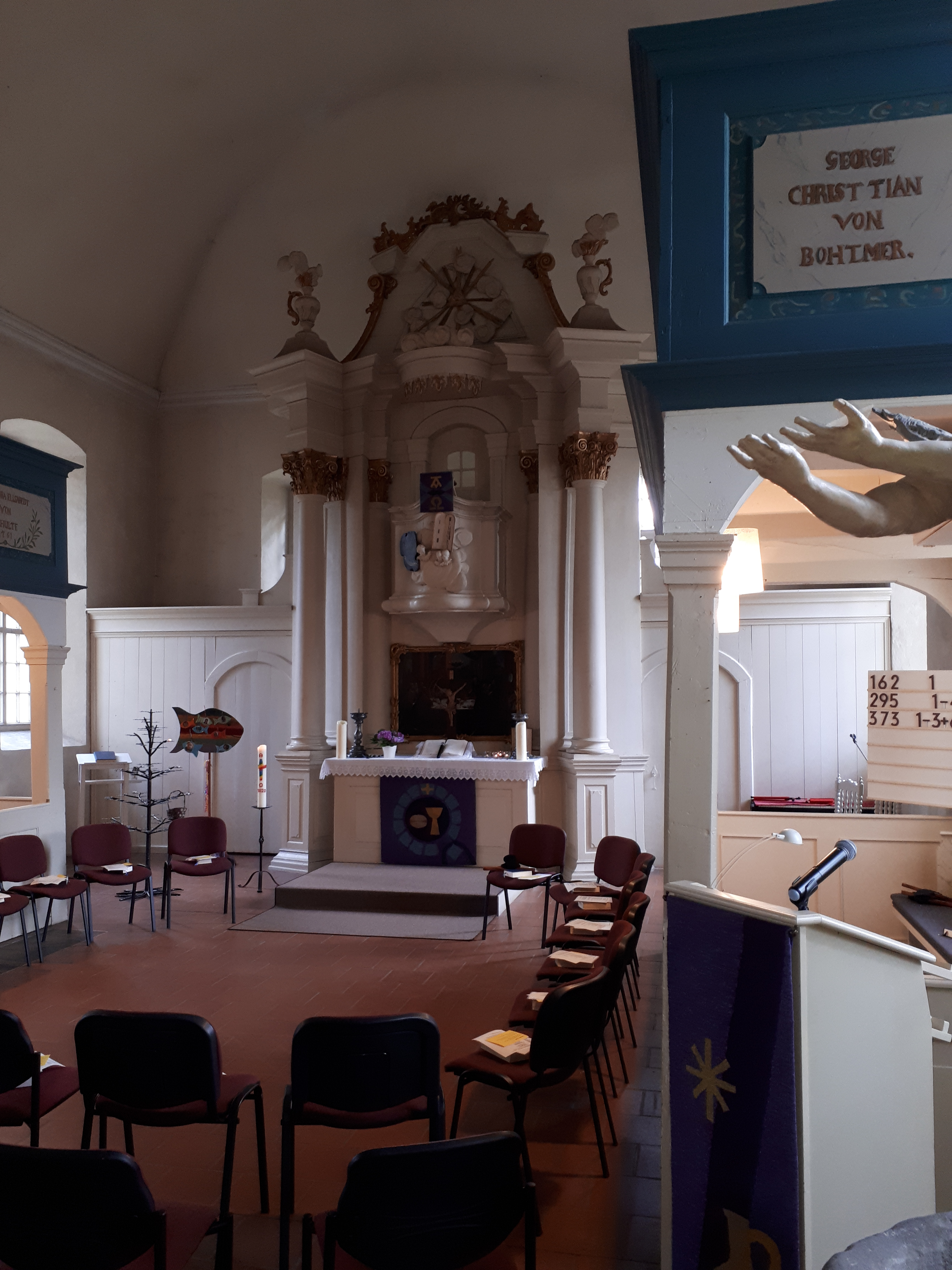 Kanzelaltar Helstorf